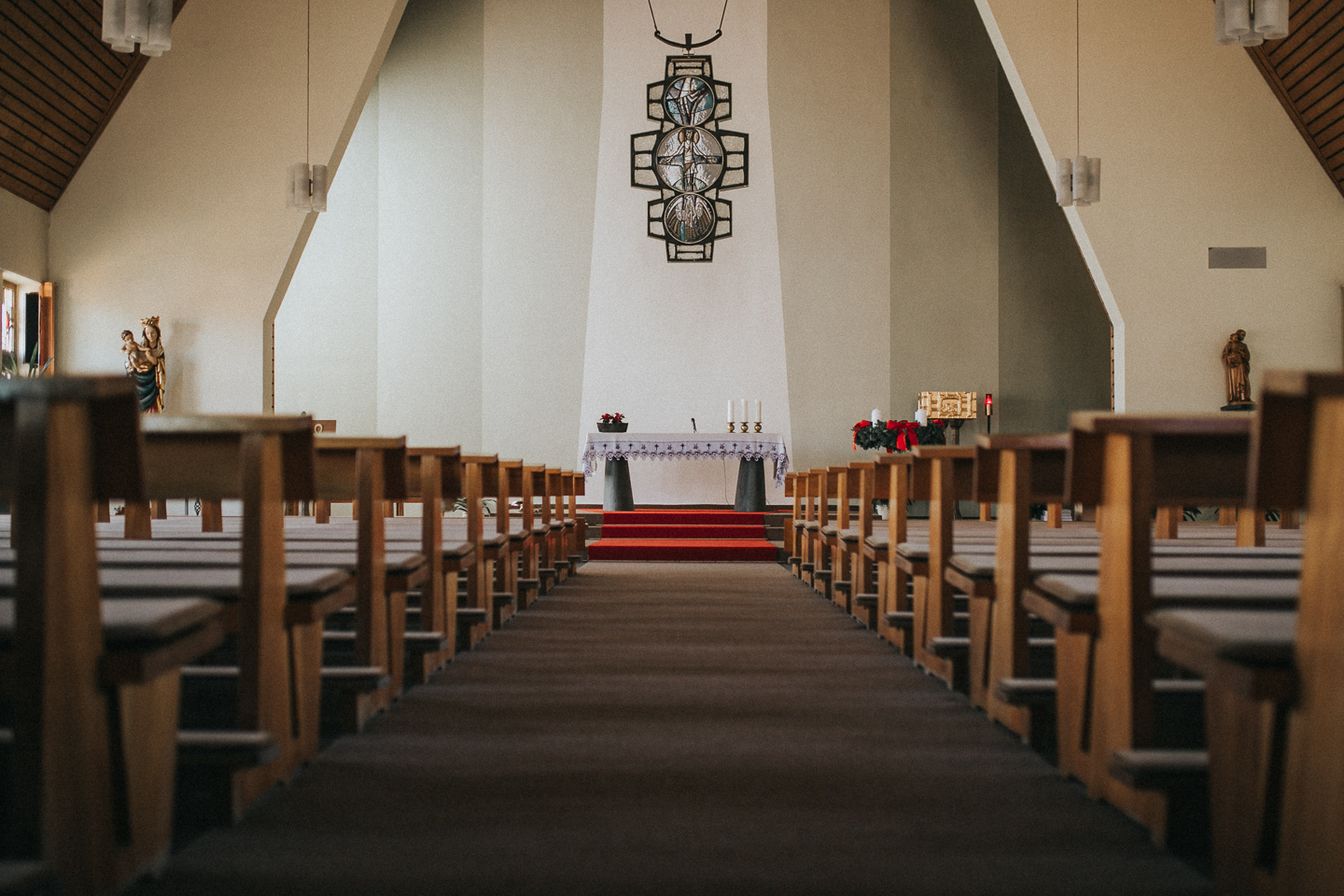 Kath. Kirche Hl. Familie in Braunlage